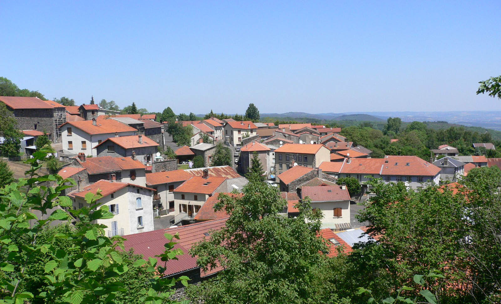 Chanat-la-Mouteyre Photo:F.Aubert